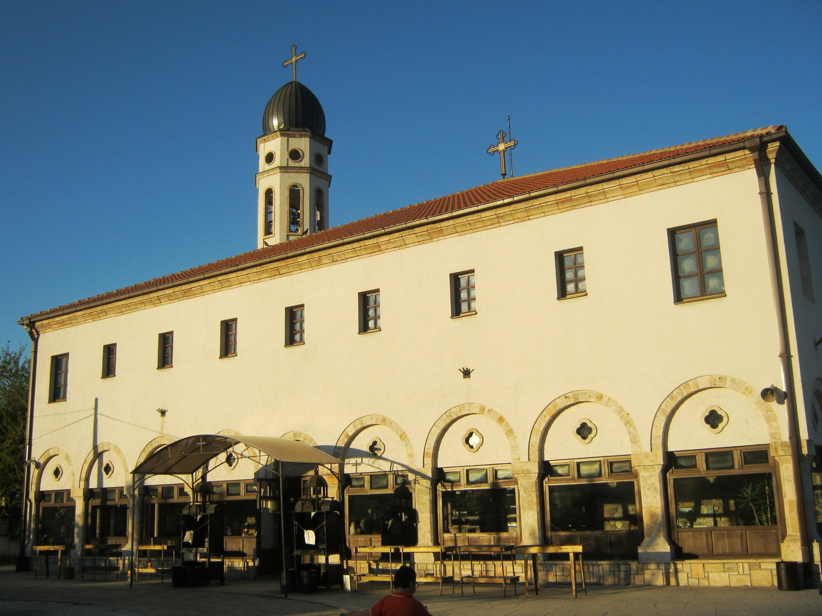 Црква св. Богородица во Скопје